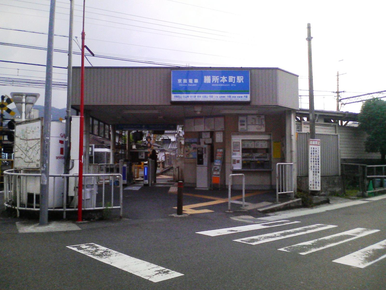 京阪石山坂本線の膳所本町駅の石山寺方面行ホーム側の駅舎を撮影。画像左側が石山寺方面、右側が坂本方面。